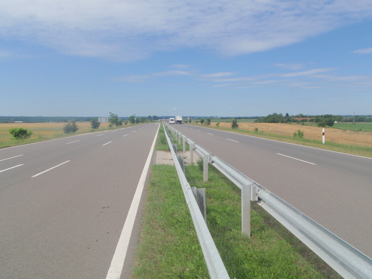 Umfarung Kaposvar, Heute B61 Strasse, im Zukunft M9 Autobahn